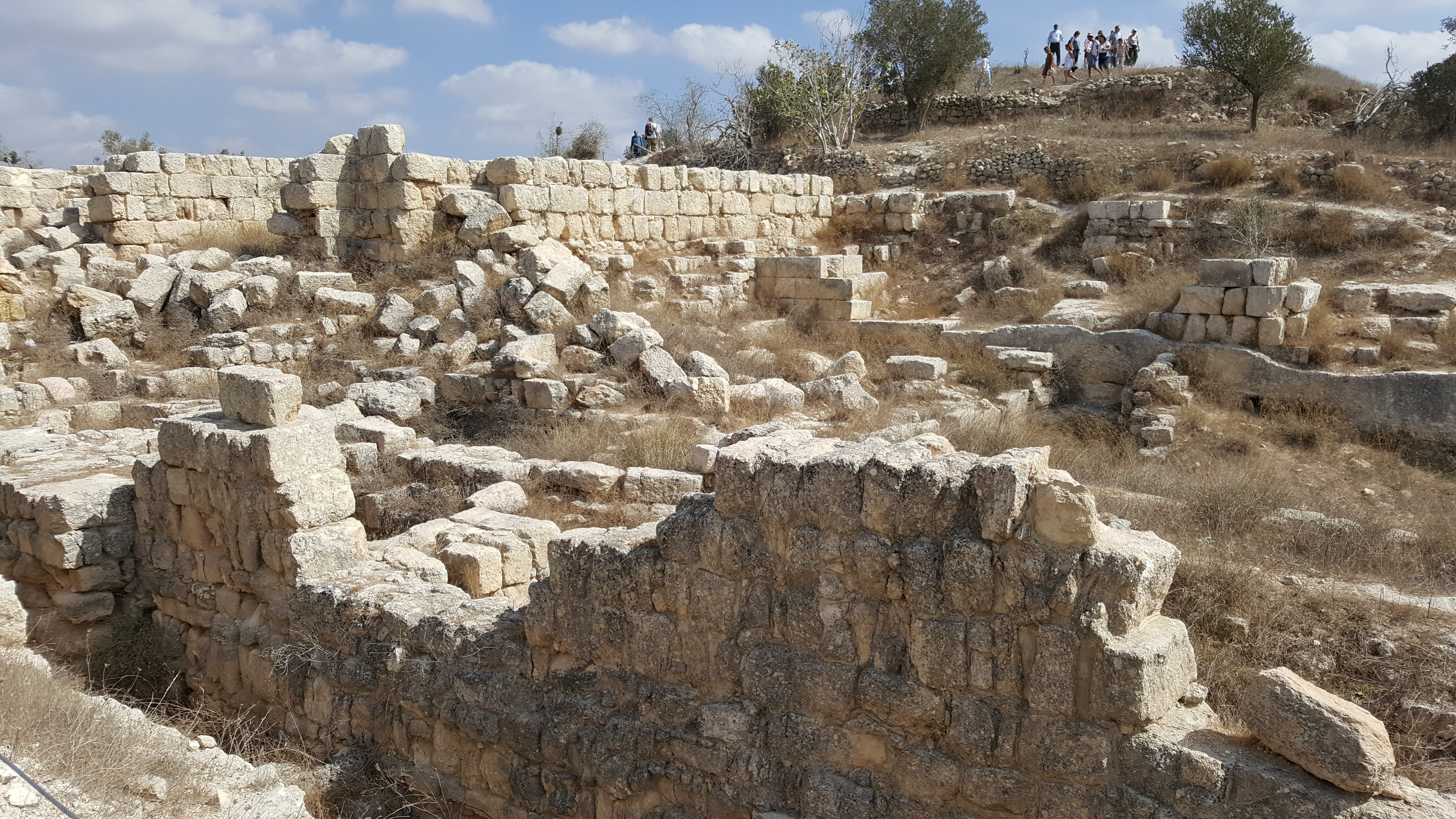 עיר קדומה בארץ ישראל. בירת ממלכת ישראל במאות ה-9 וה-8 לפנה"ס.